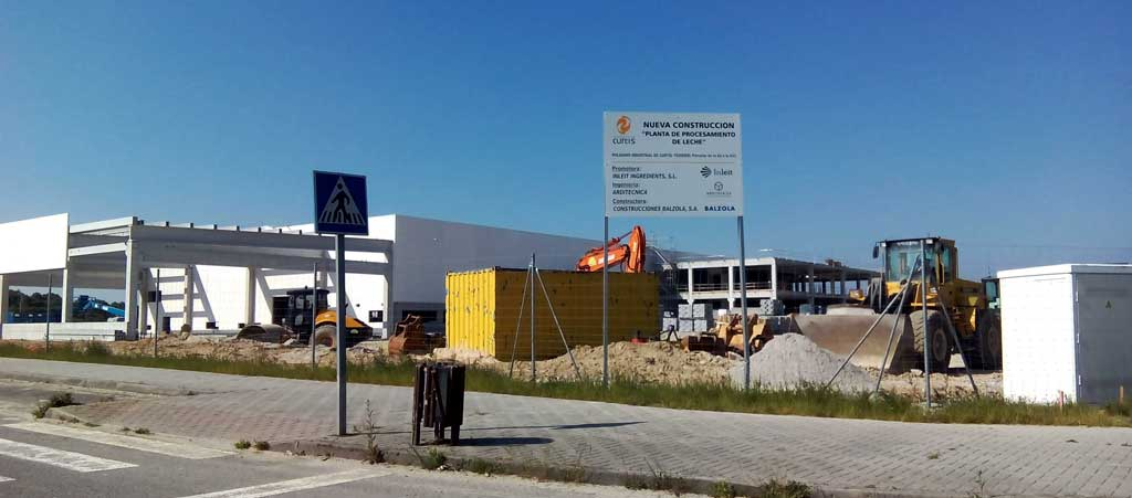 Goodlait en construción 2018.